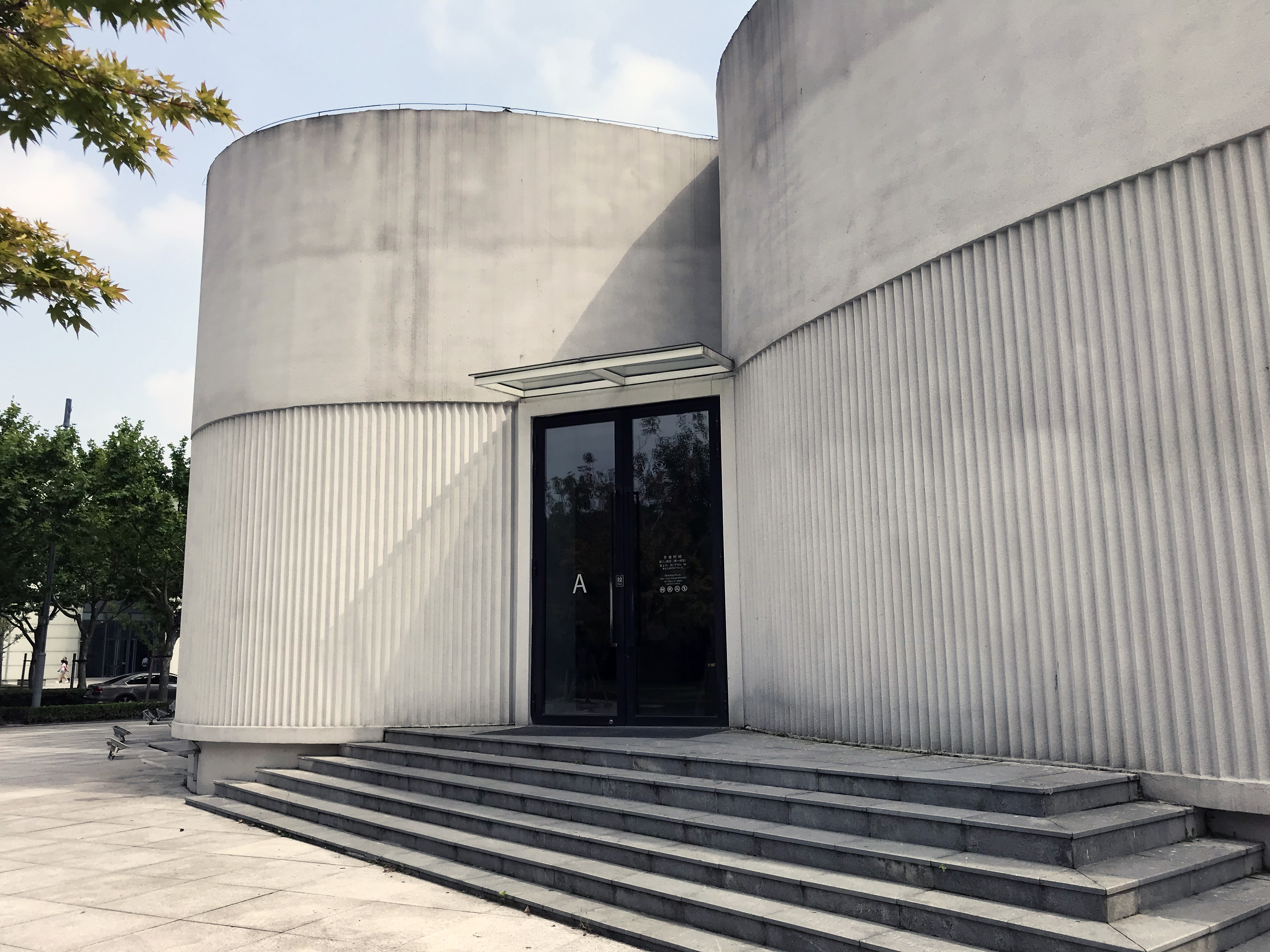 上海摄影艺术中心正门Shanghai center of photography,main entrance,June 2020.jpg